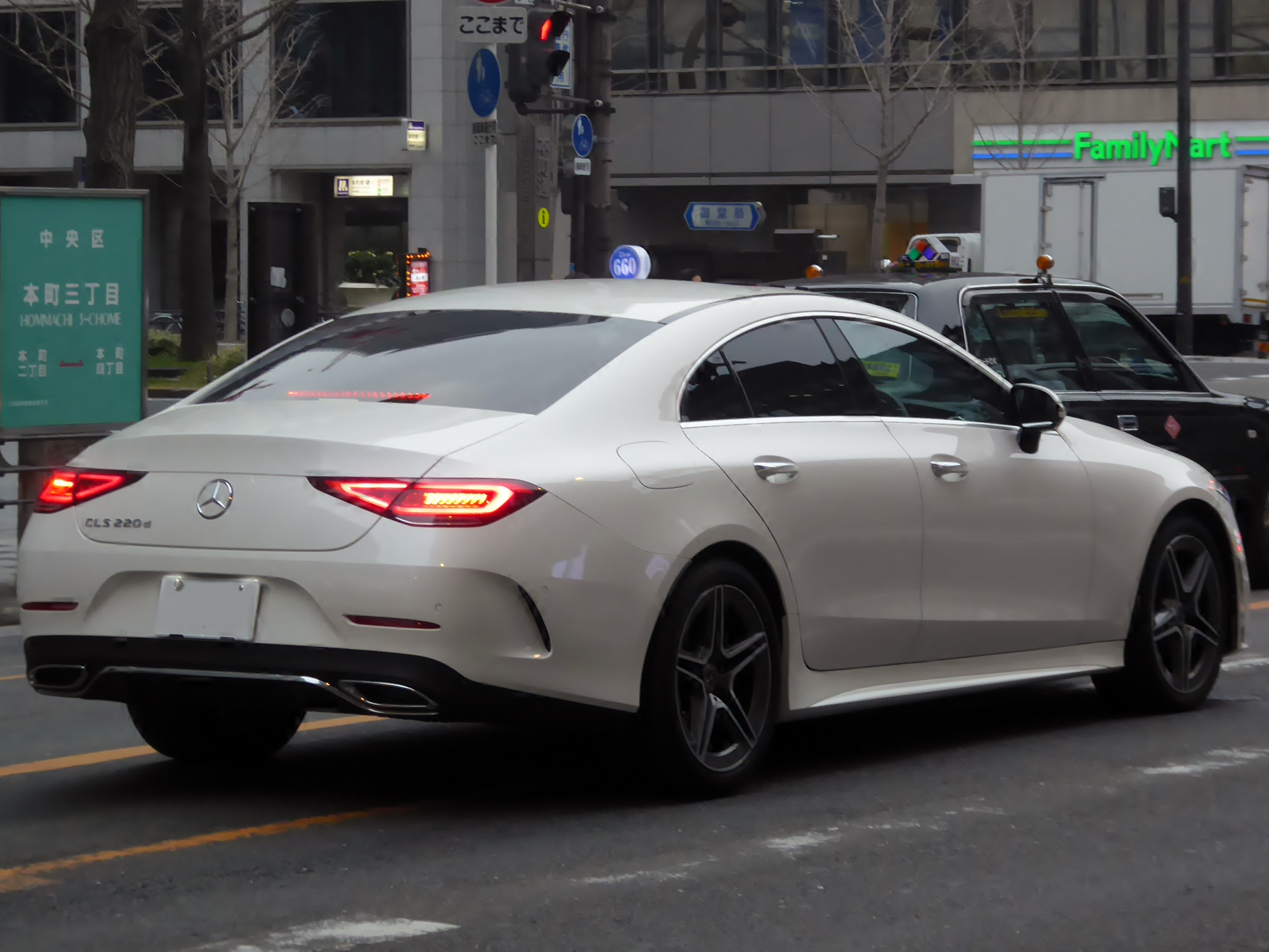 C257系メルセデス・ベンツ・CLS220dスポーツクーペをリアから撮影。